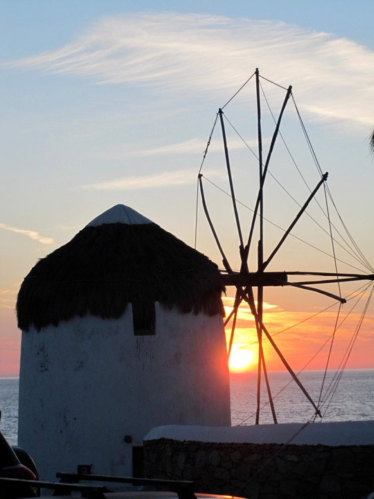 Eines der Wahrzeichen der Insel Mykonos!